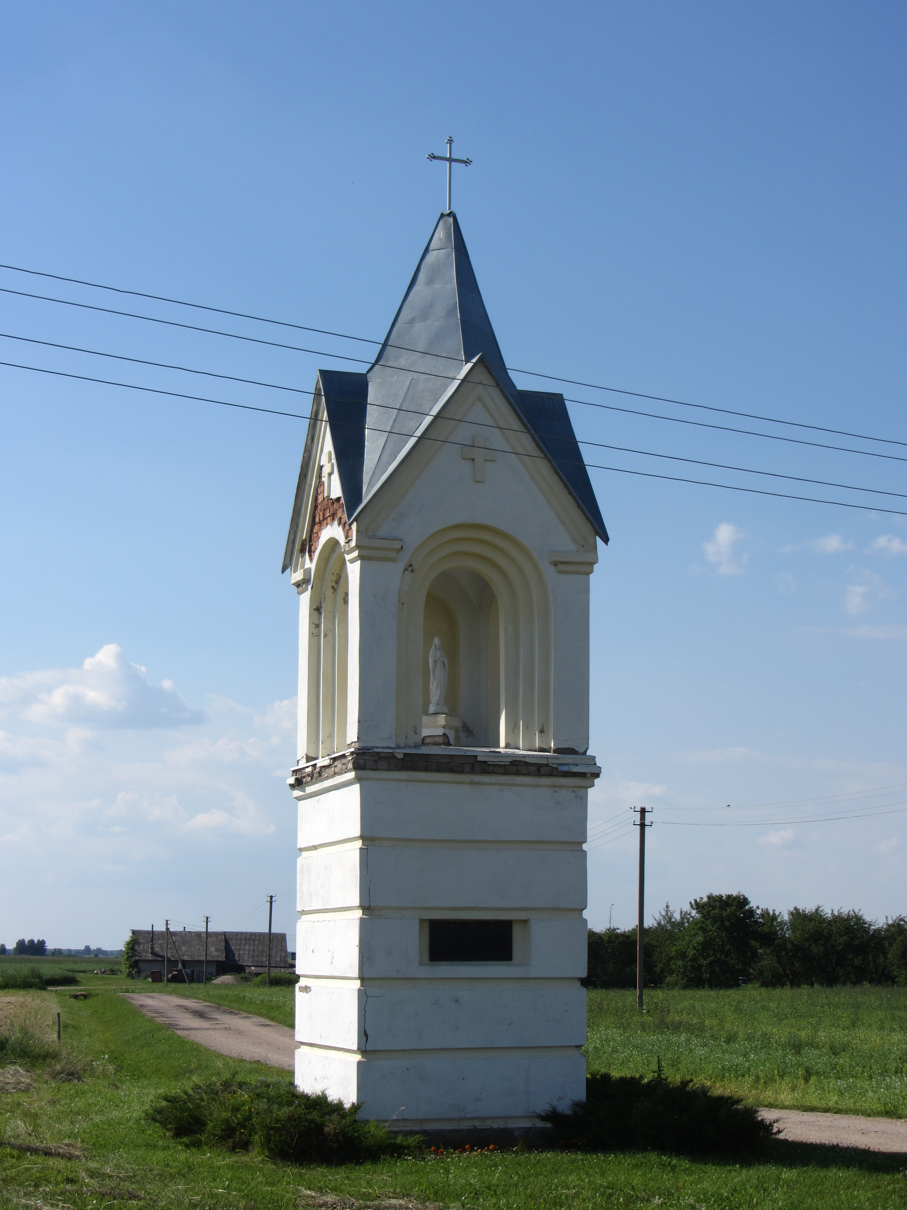 Adutiškio sen., Lithuania